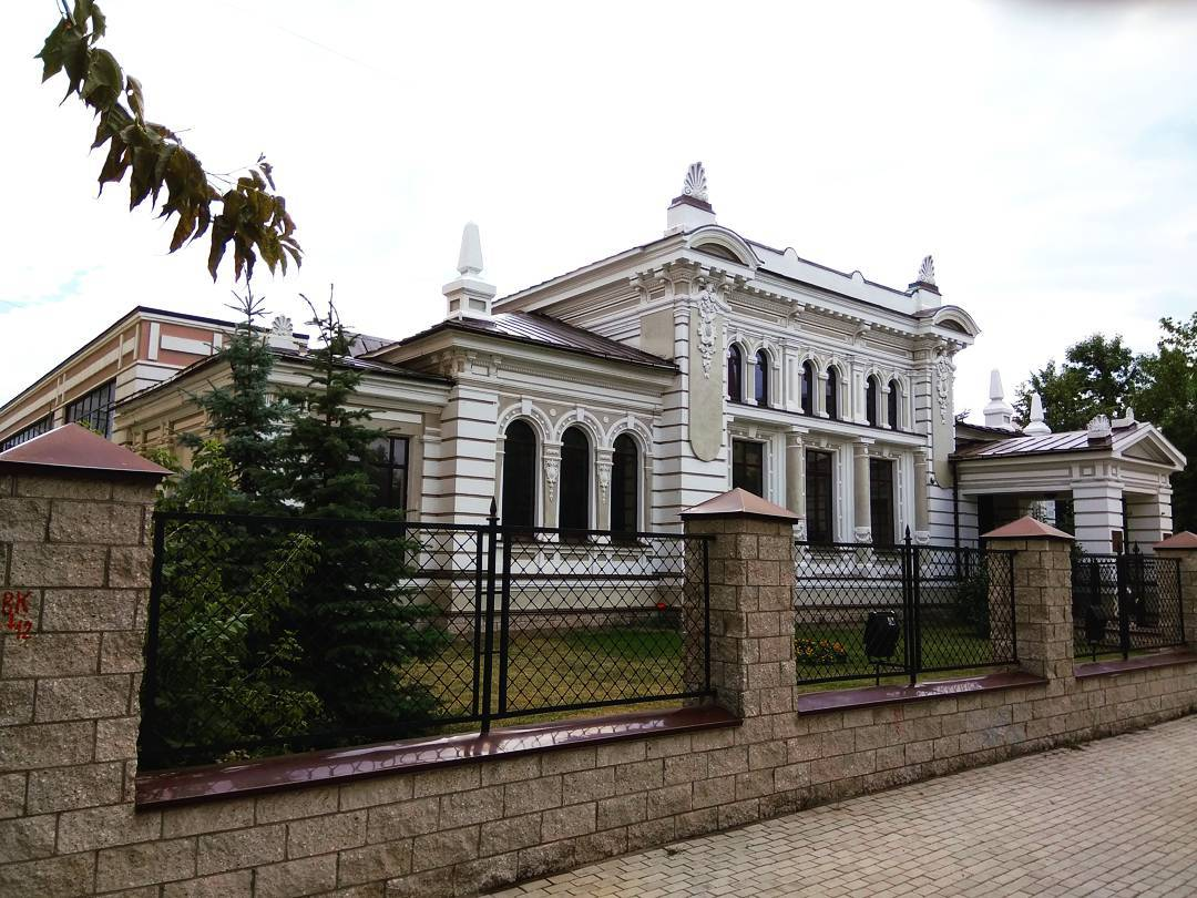 Дореволюционный особняк на улице Карла Маркса